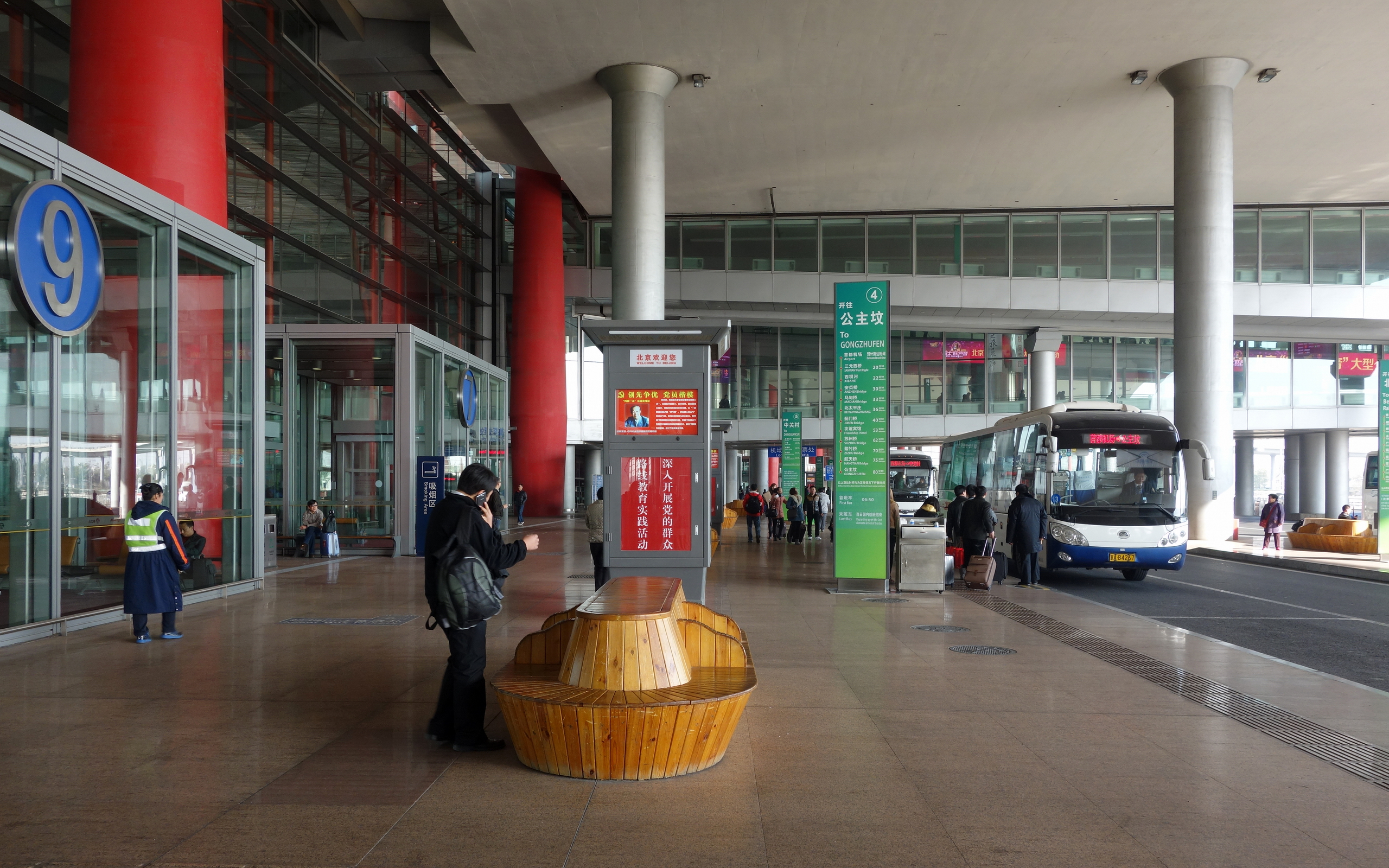 北京首都国际机场3号航站楼到达出口。